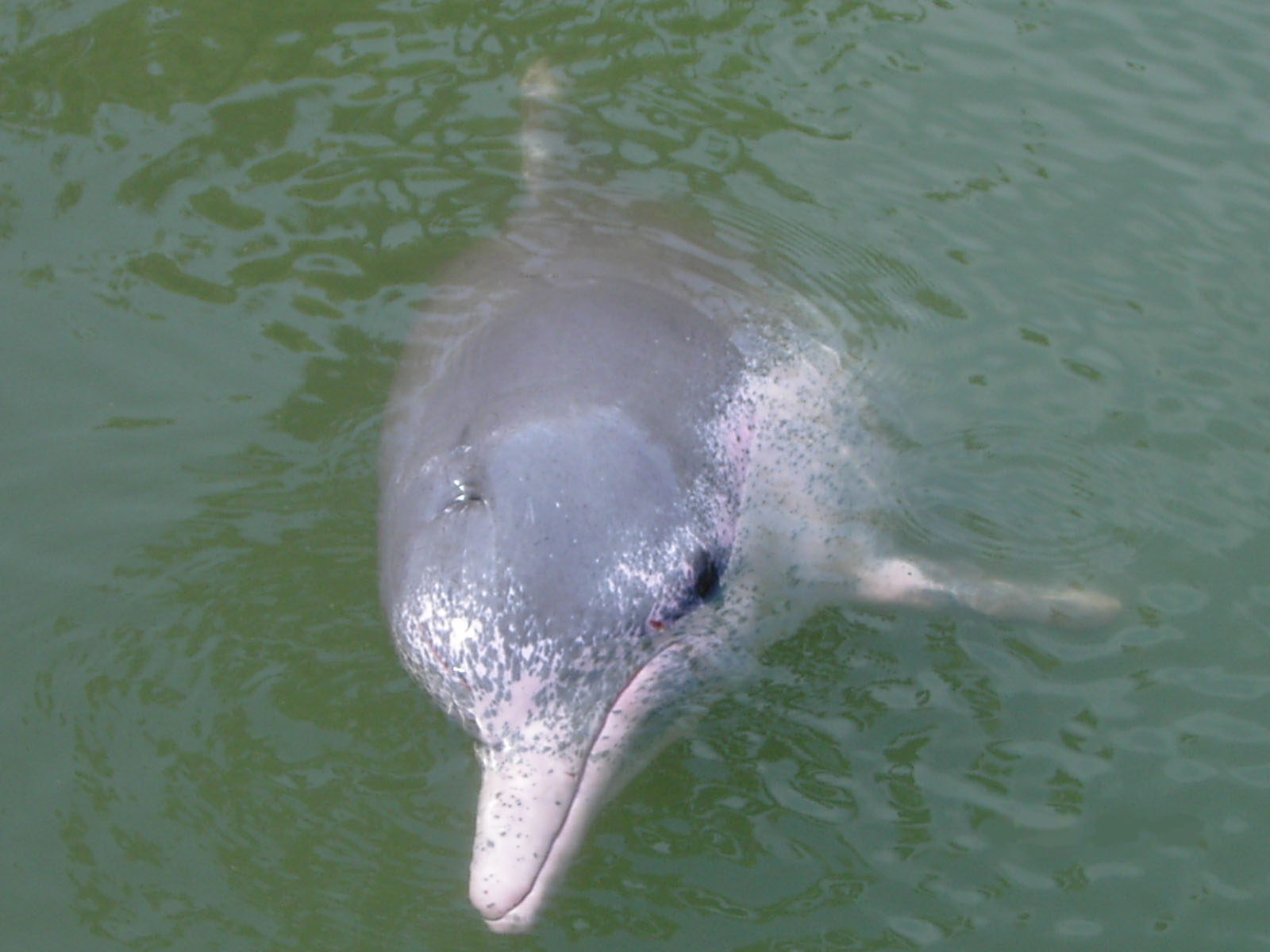 Pink river dolphine